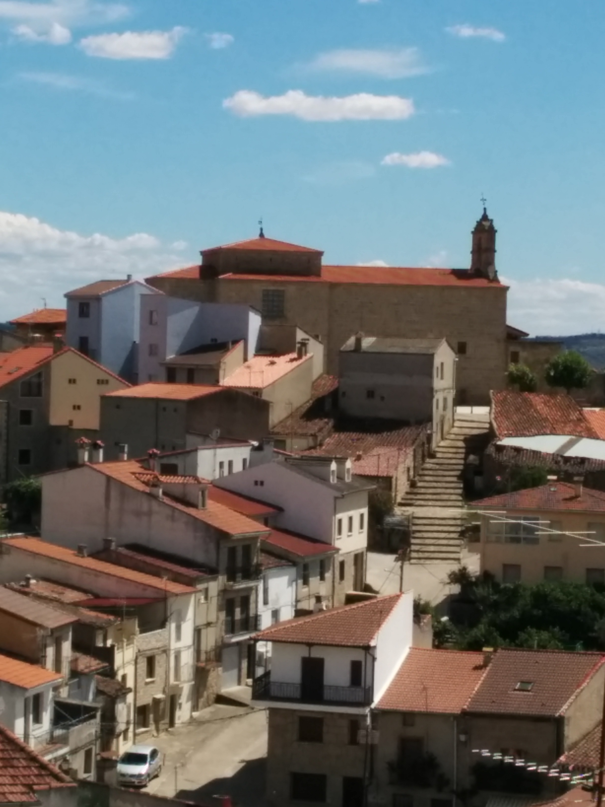 Arribes del Duero This is a photography of a Special Area of Conservation in Spain with the ID: ES4150096. Natura2000 entry, EEA entry